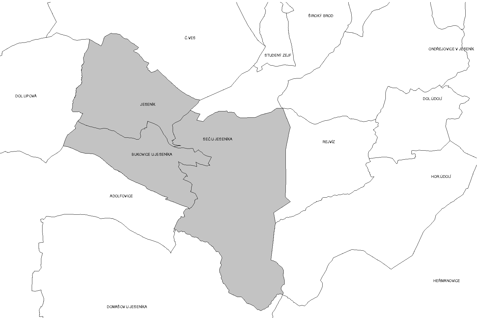 Katastrální členění Jeseníku